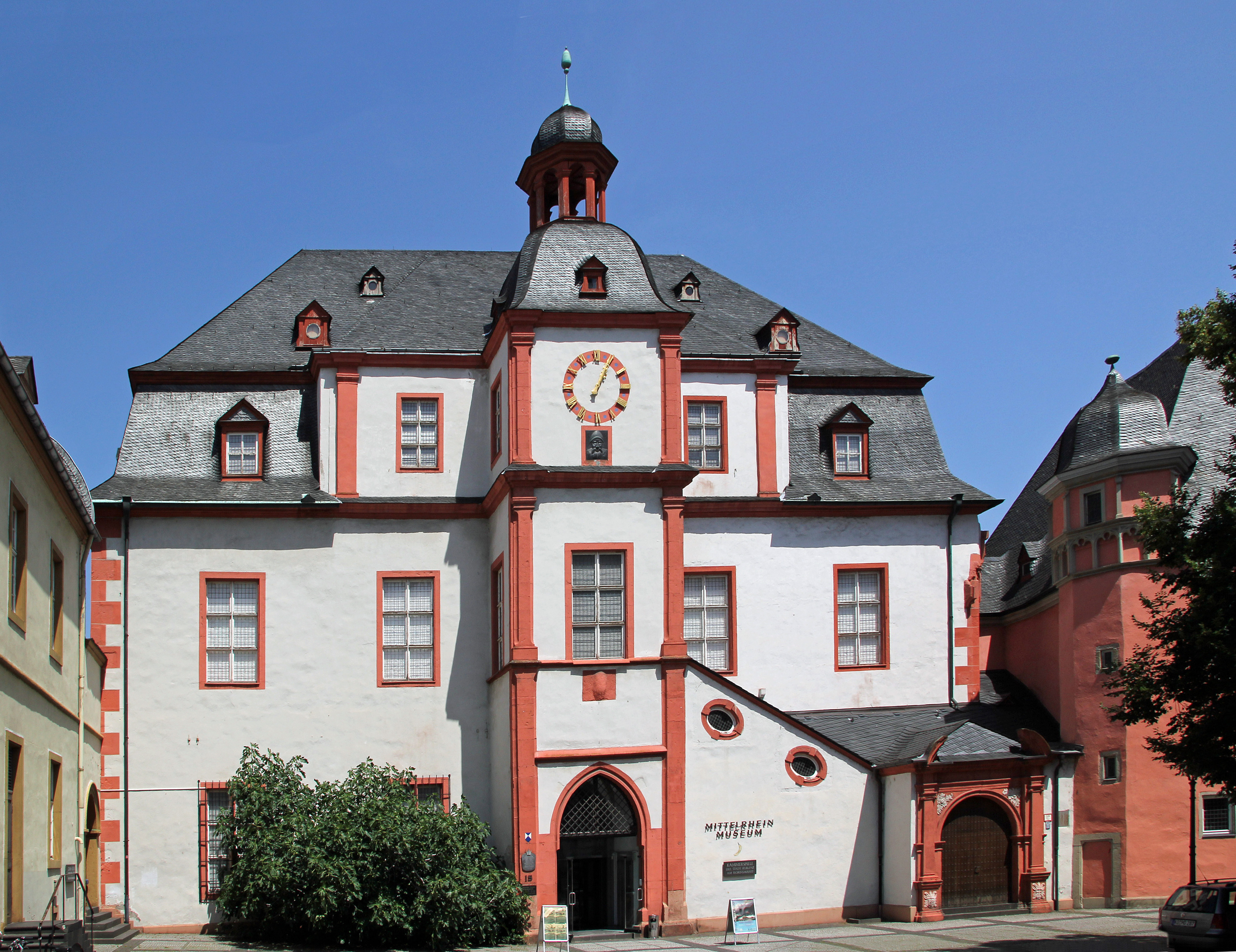 Koblenz im Buga-Jahr 2011 - Das Alte Kaufhaus